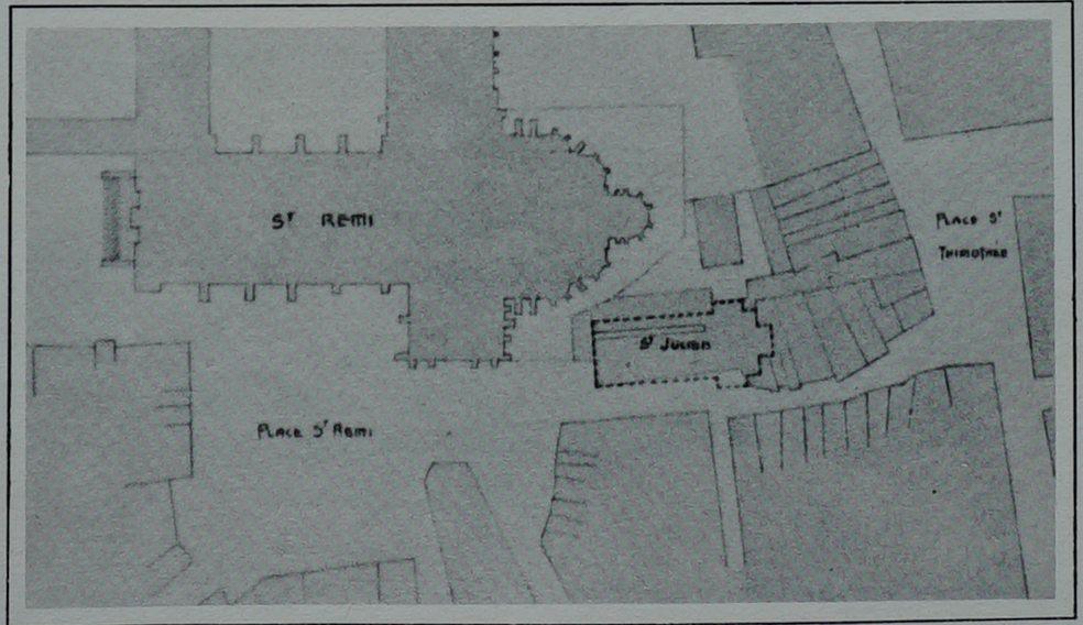 vue de la Église st Julien sur un plan Reims.